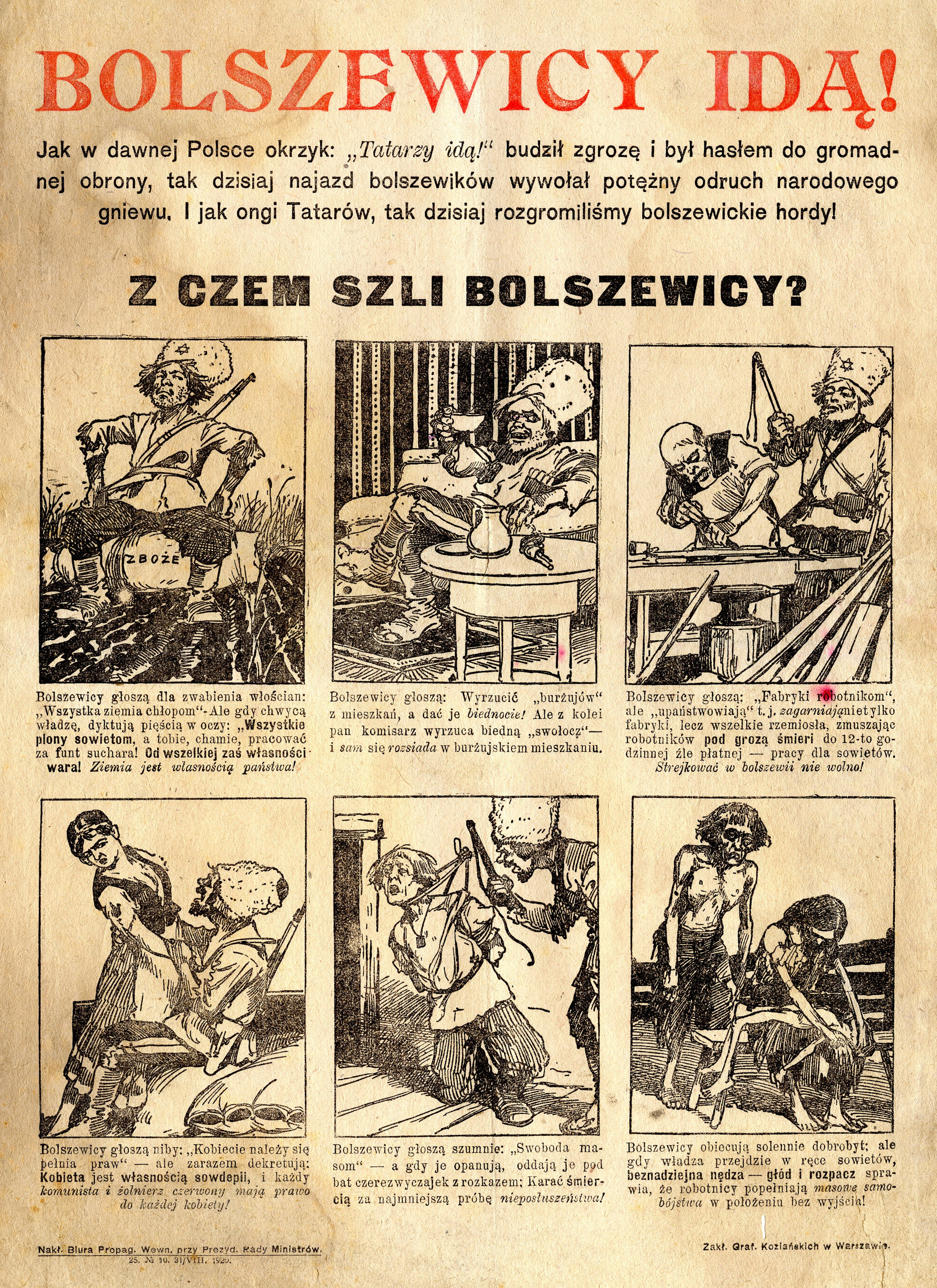 Polish anti-bolshevick propaganda piece. Polish-Soviet War. Biuro Propagandy Wewnetrznej. 31 VIII 1920.